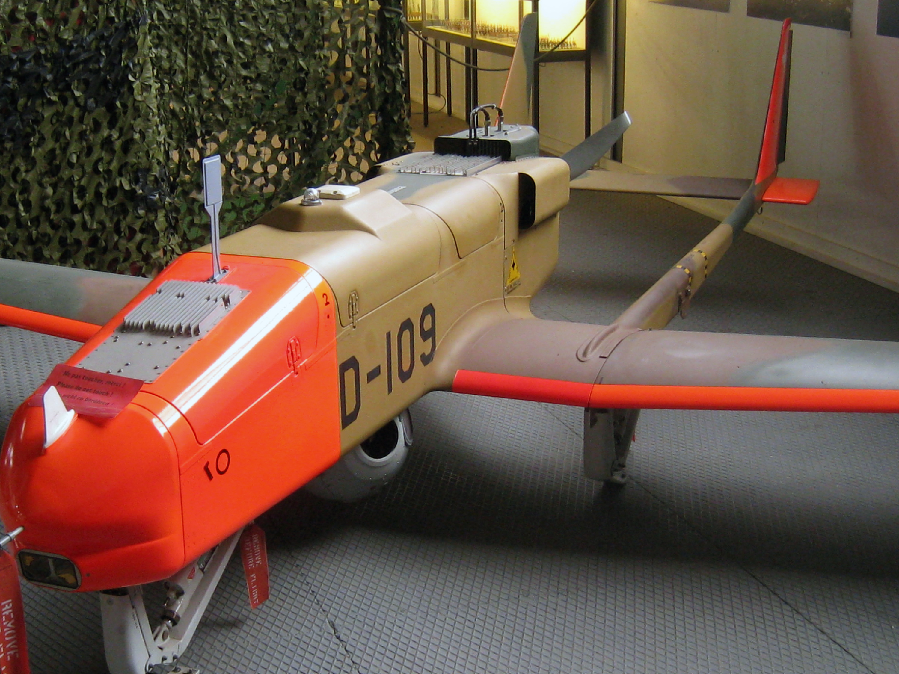 Aufklärungsdrohne ADS 95 der Schweizer Armee im Militärmuseum Full